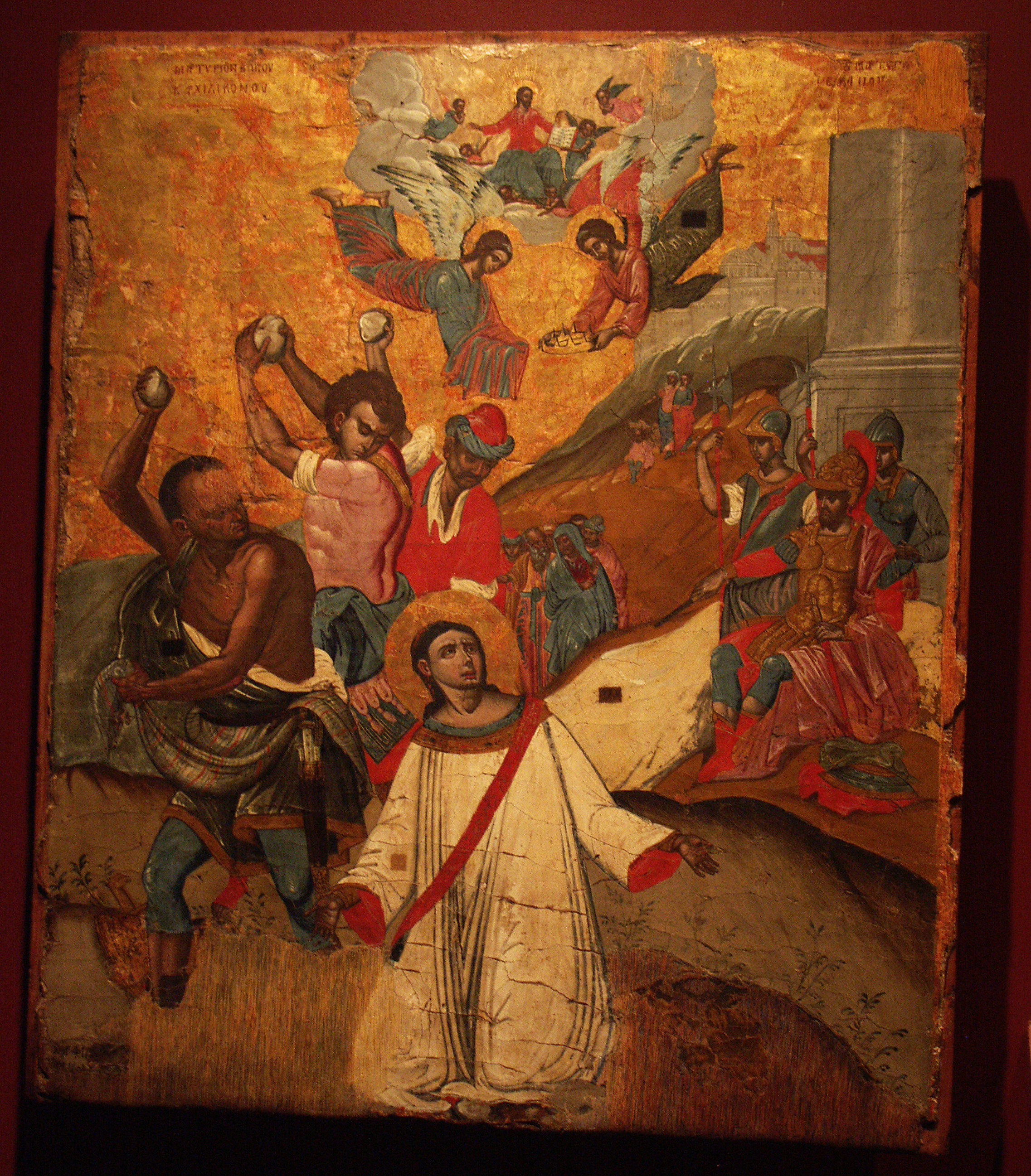 Etienne ou Stephanos, le "couronné" en grec, est le premier martyr de la chrétienté, à Jérusalem vers 35. Skoufos est un peintre d'icônes crétois émigré pour fuir la menace turque.